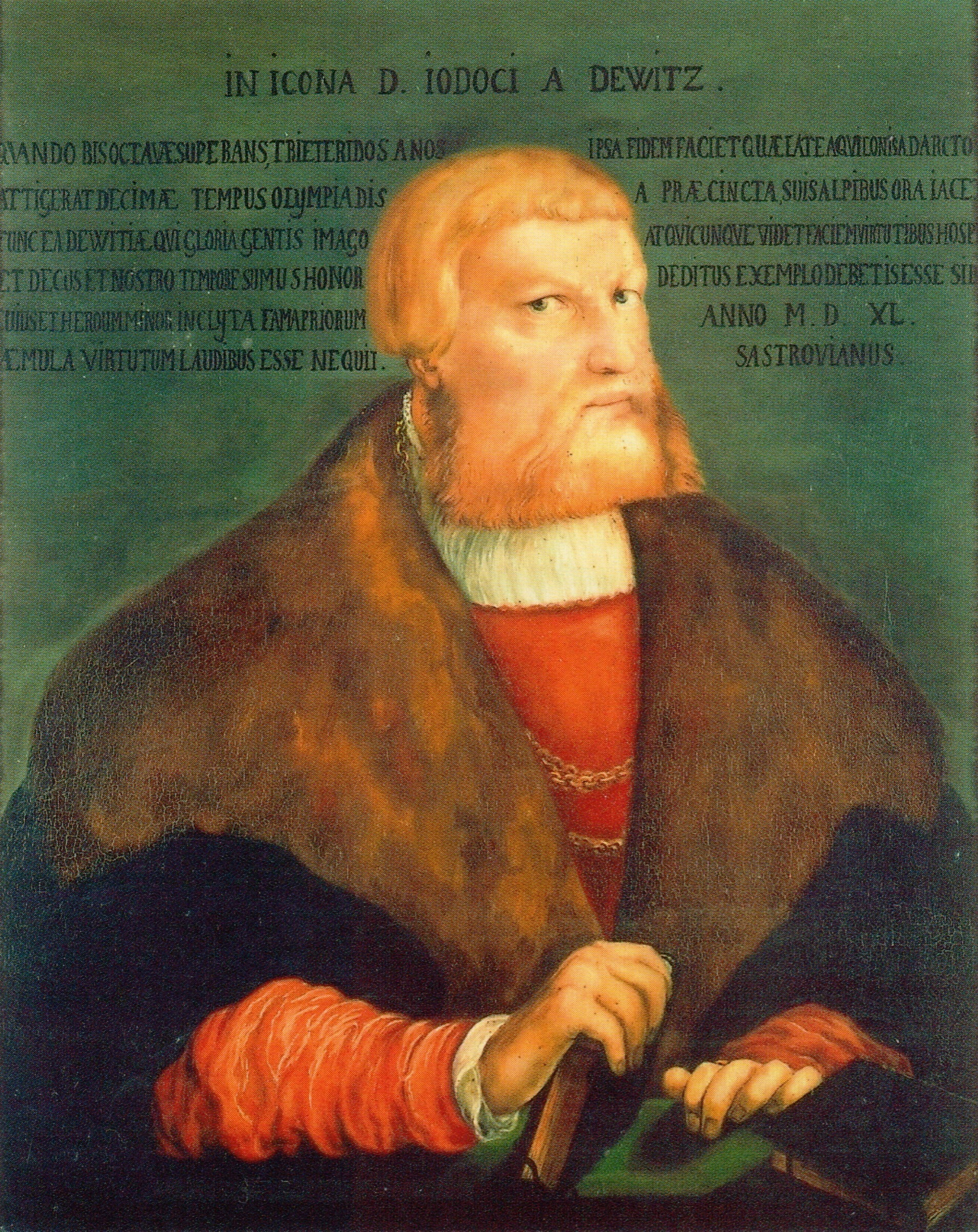 Portrait von Jobst von Dewitz; Kopie nach einem Gemälde der Cranach-Schule.